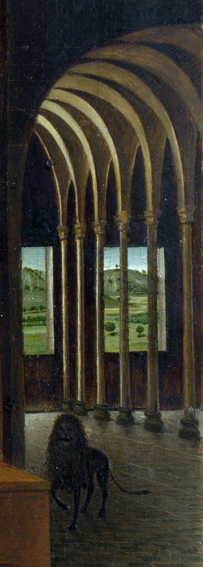 Detail aus dem Gemälde Der hl. Hieronymus im Gehäuse von Antonello da Messina: Der Löwe unter dem Rundgewölbe.